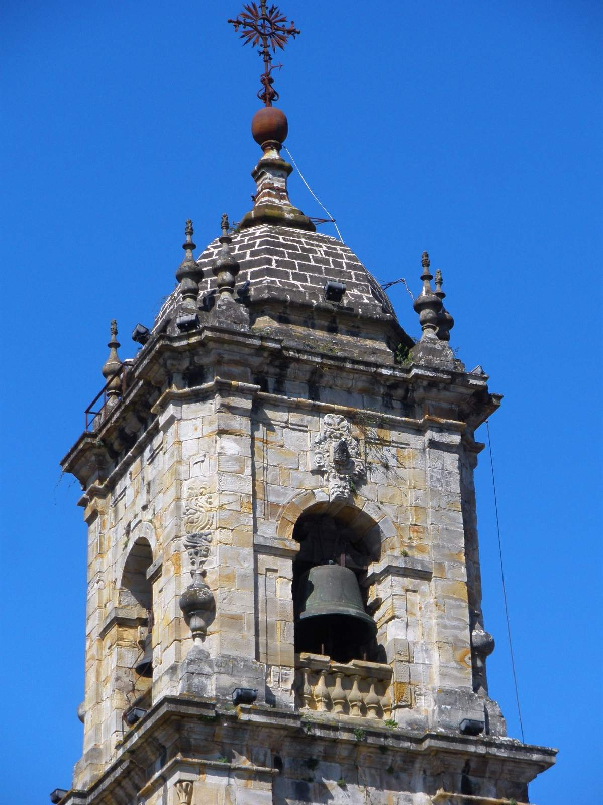 Elorrio - Iglesia de San Agustín de Etxebarria